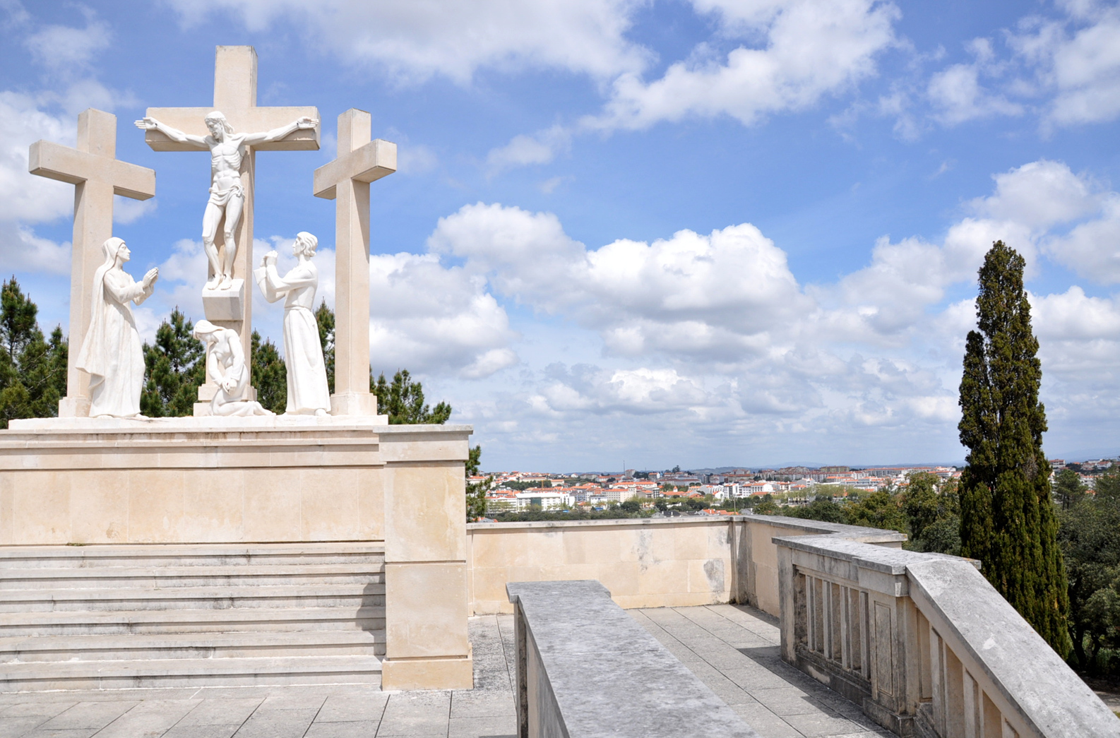 Calváro Hungaro Fatima 0631